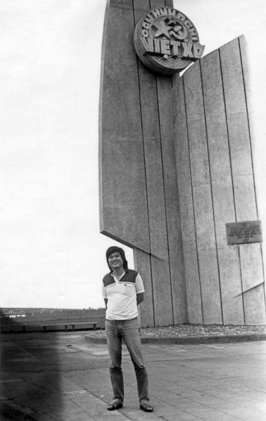 Biểu tượng Hữu nghị Việt- Xô hình Cánh buồm tại đầu cầu Thăng Long